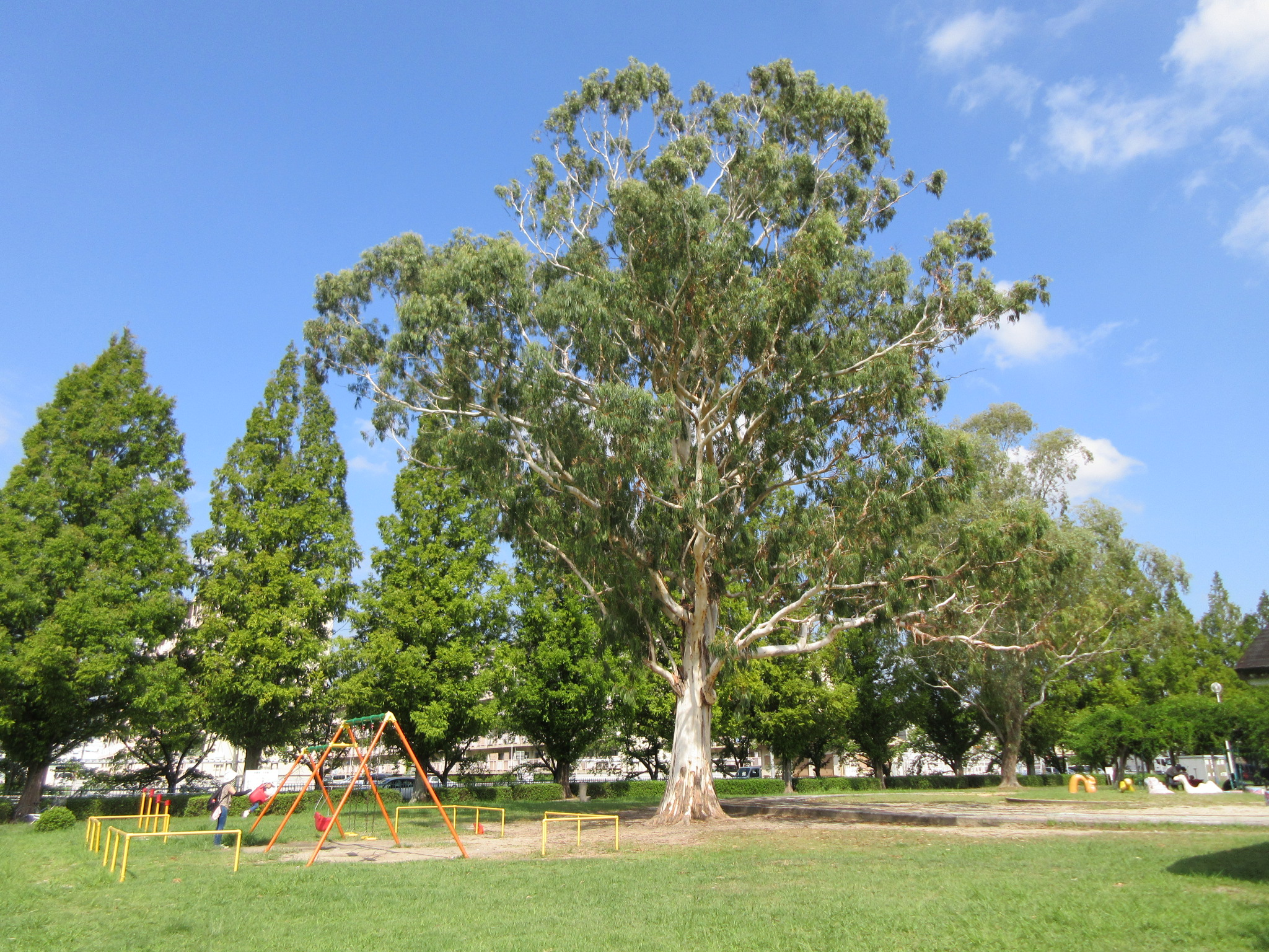 三百田公園（岡崎市大樹寺3丁目）